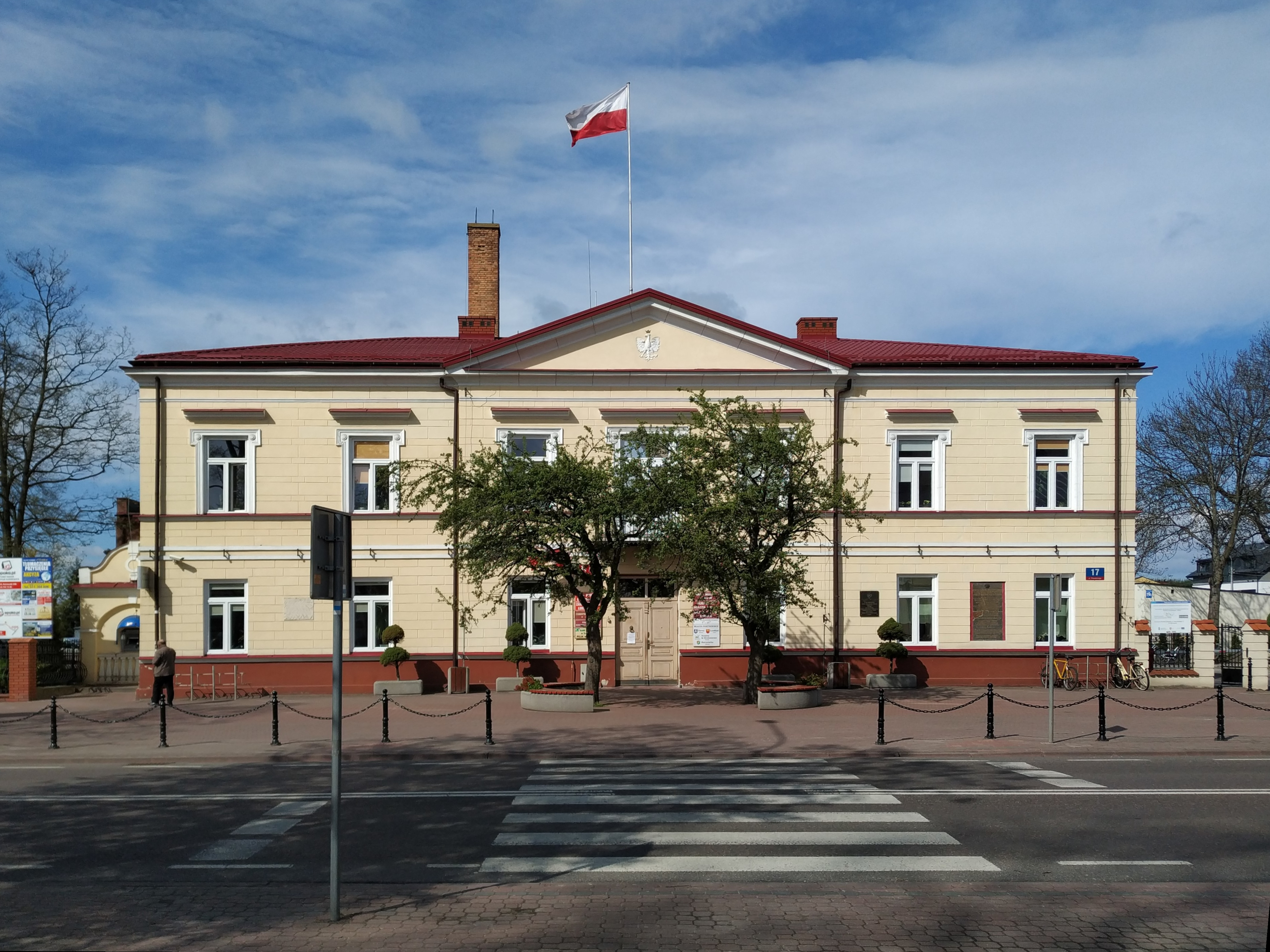 Budynek Urzędu Miasta Łuków